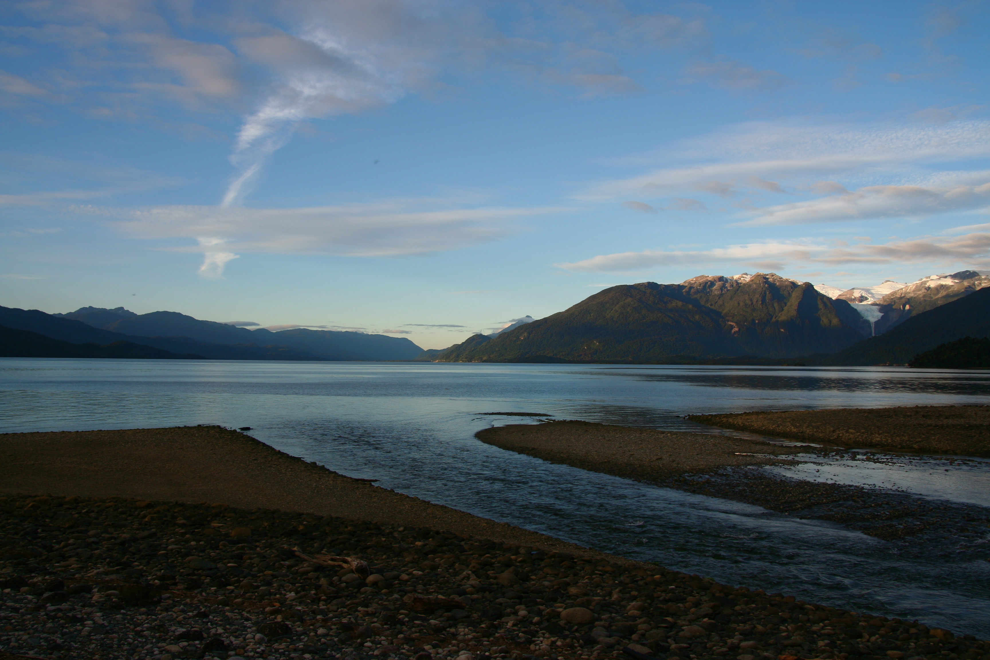 Canal Puyuhuapi, Chile.